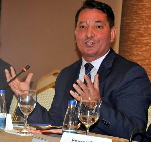 Pal Lekaj